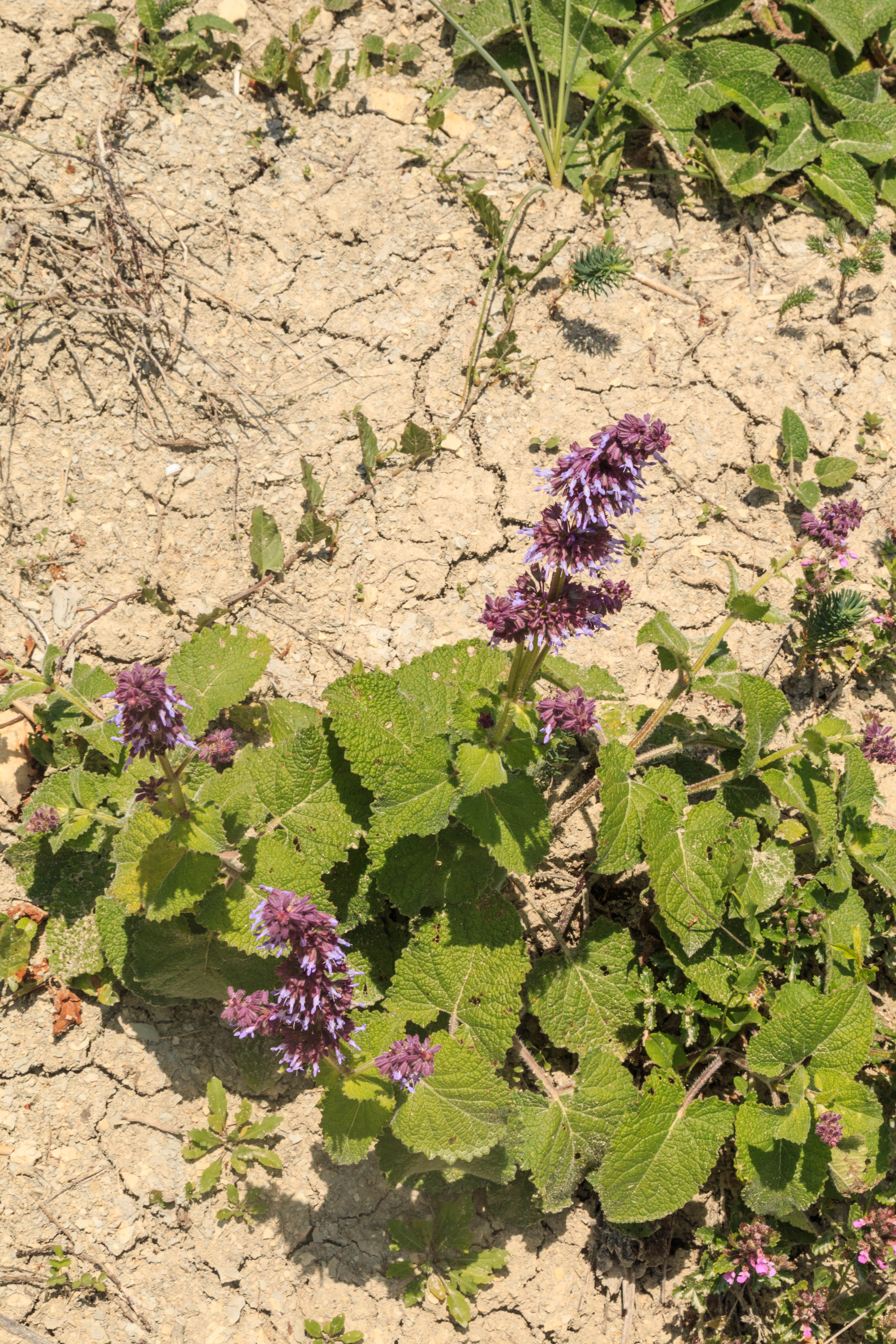 Přírodní památka Báň Project: Chráněná území.